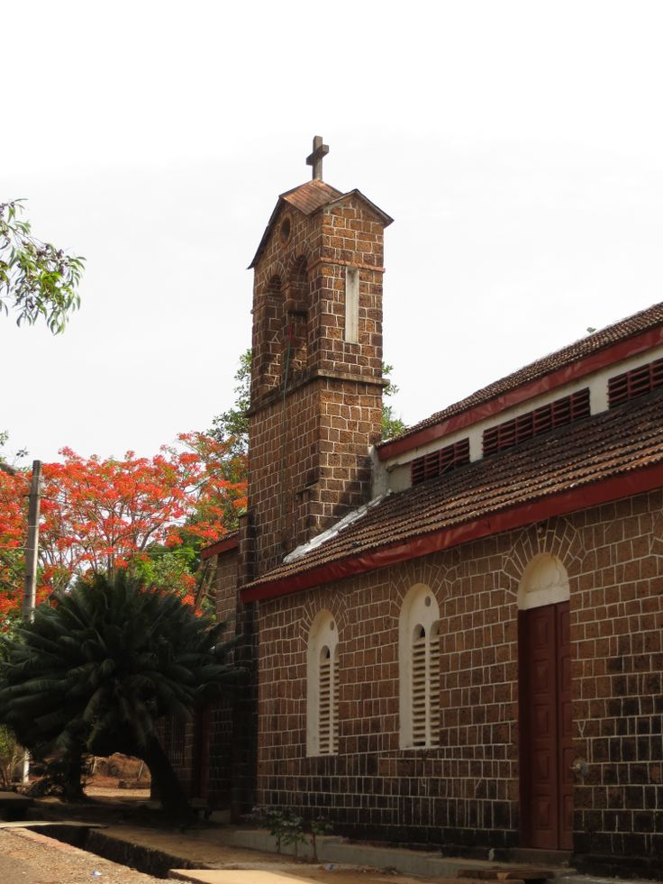 Plus vieille église de guinée